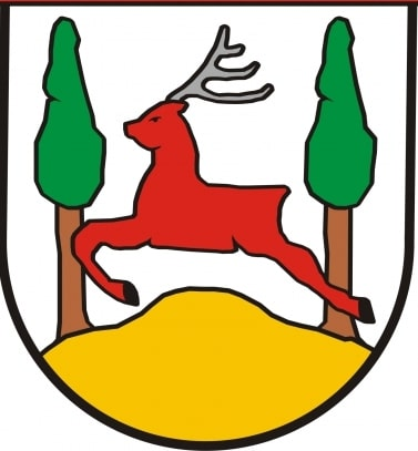 Herb Piasków (powiat gostyński)